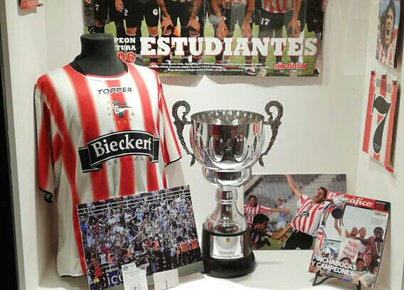 Exhibición del trofeo del Campeonato Apertura 2006 en el Museo del Club Estudiantes de La Plata.